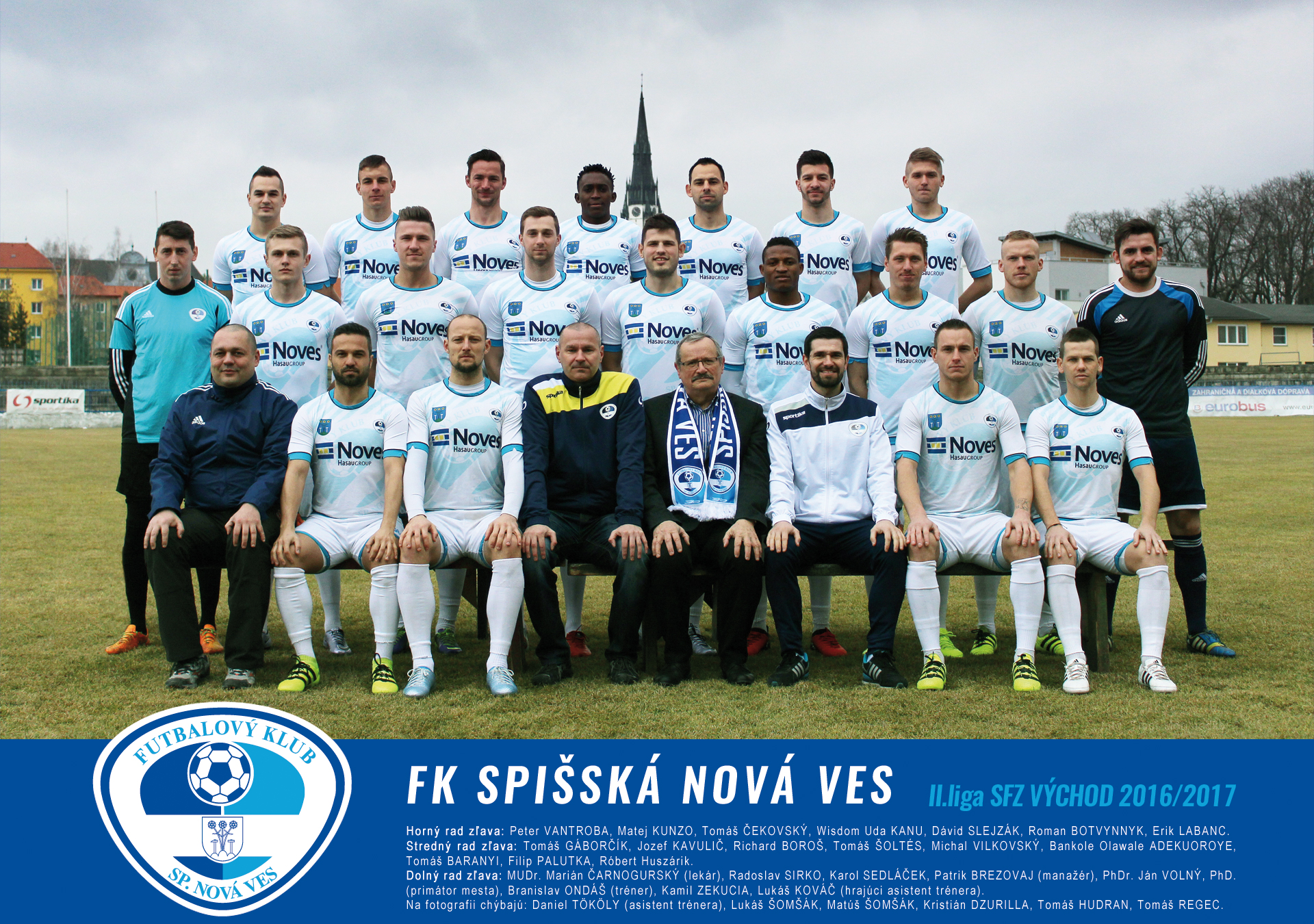 Mužstvo, ktoré postúpilo do celoslovenskej II.ligy SFZ pre súťažný ročník 2017/2018